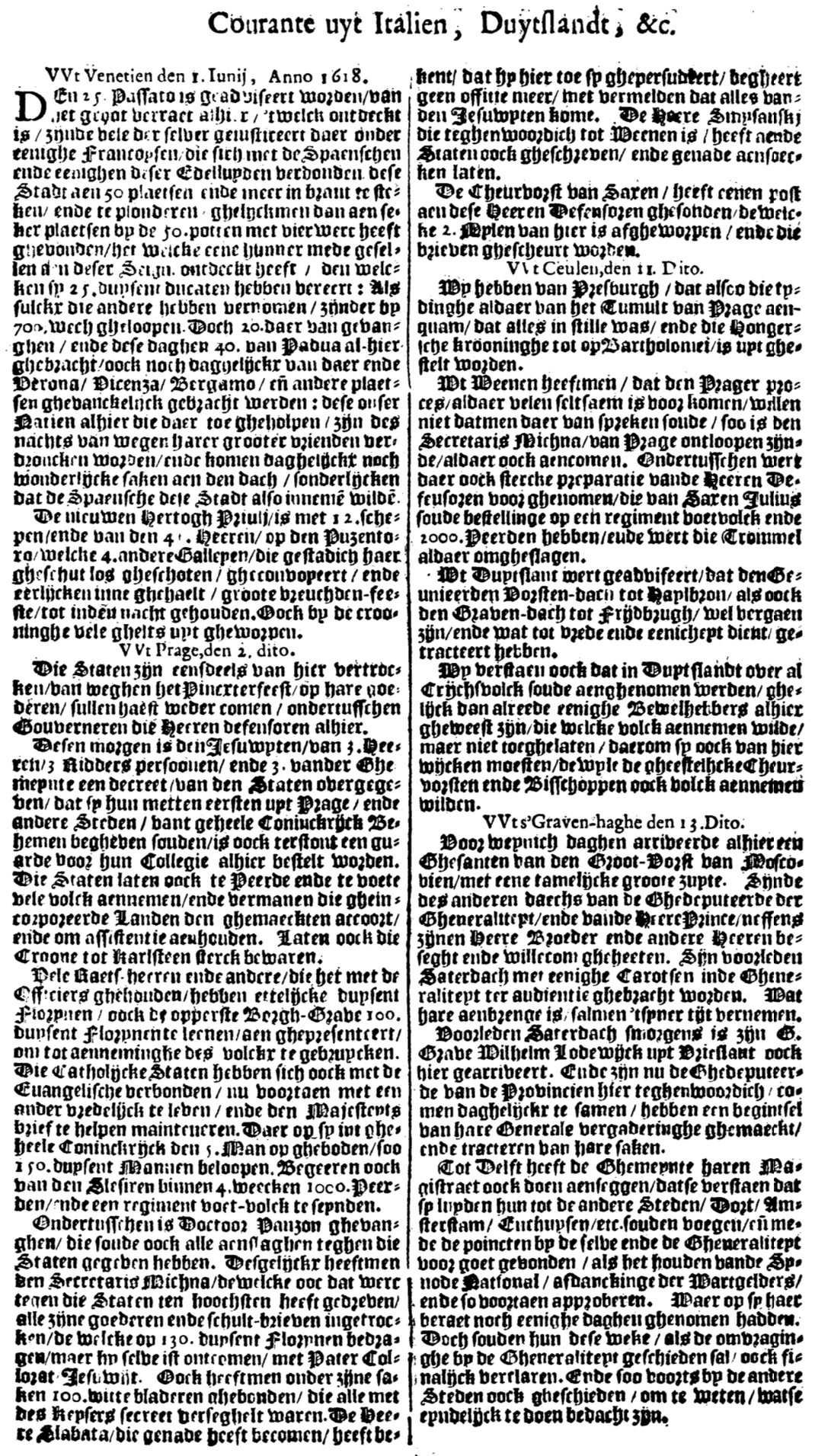 Courante uyt Italien, Duytslandt, &c., uitgeverij